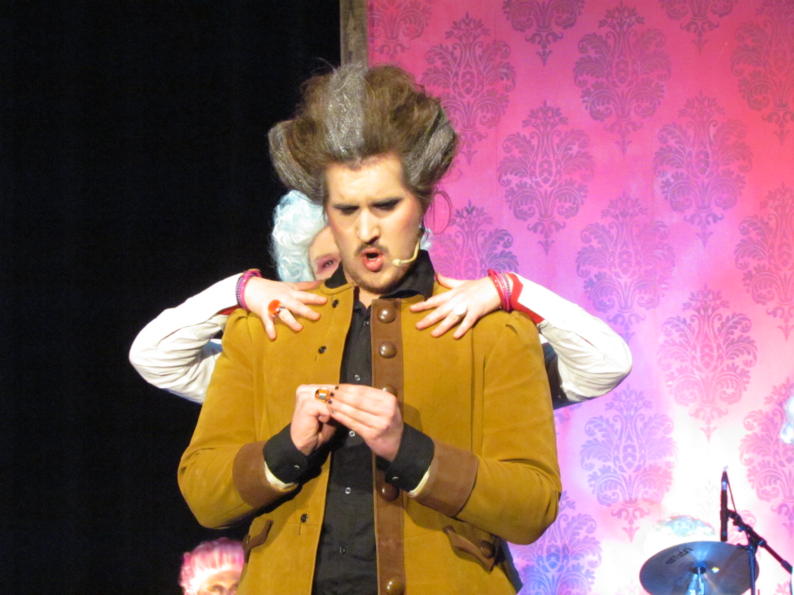 Cardillacs Ballade über seine Liebe zu Gold und Edelsteinen und dem von ihm gefertigten Schmuck